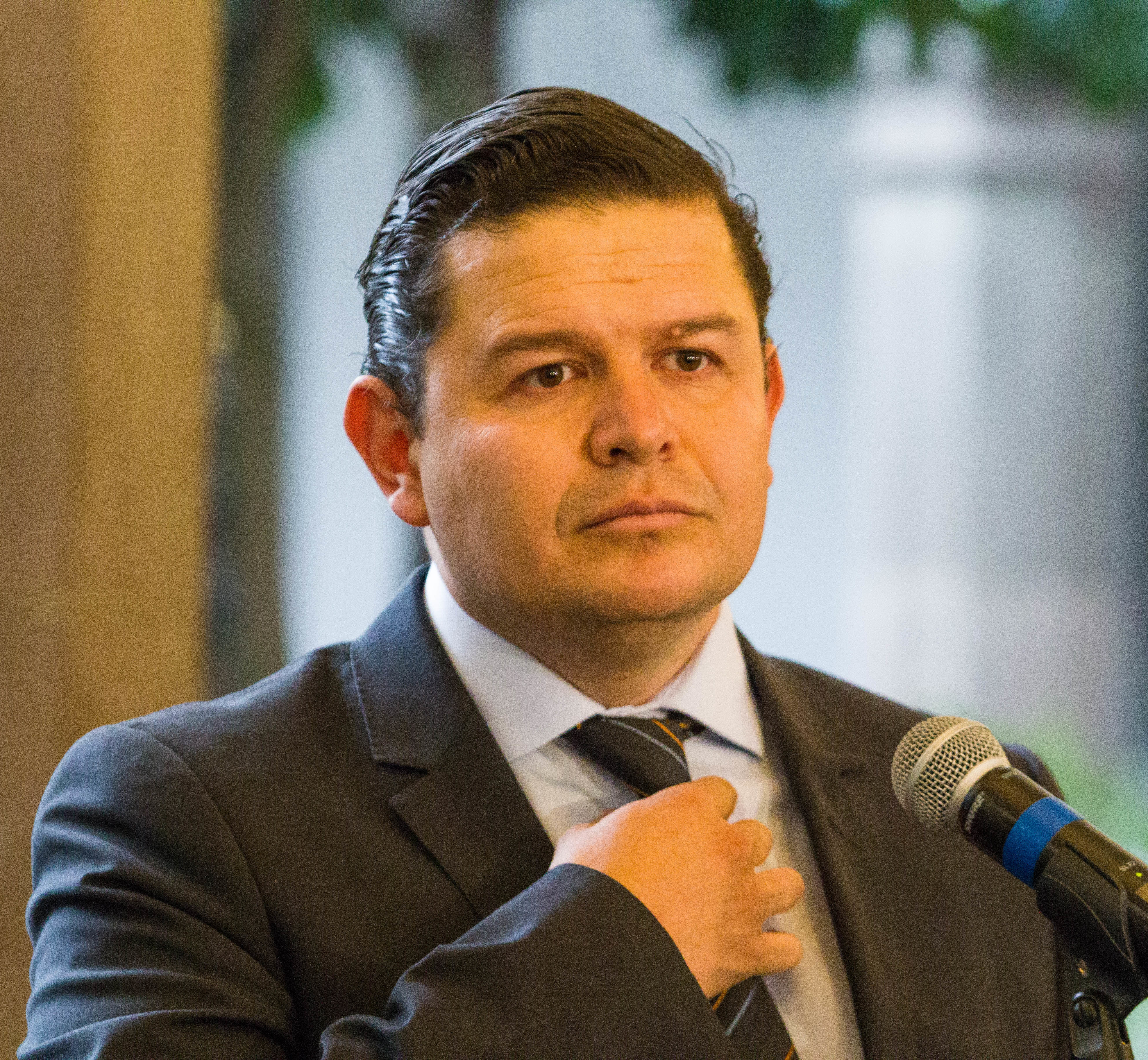 secretario particular